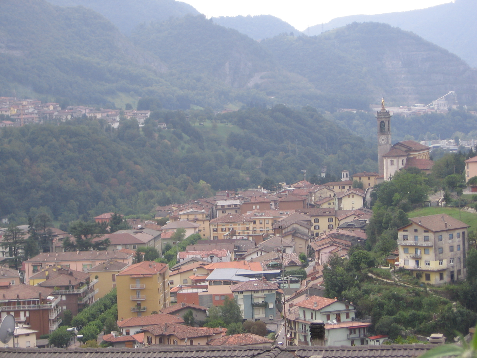 Zogno, Bergamo, Italy